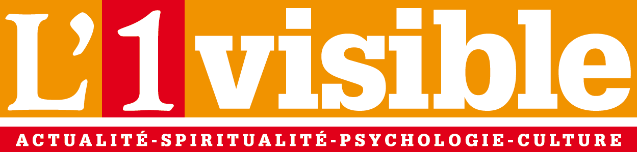 Logo du journal gratui catholique L'1visible